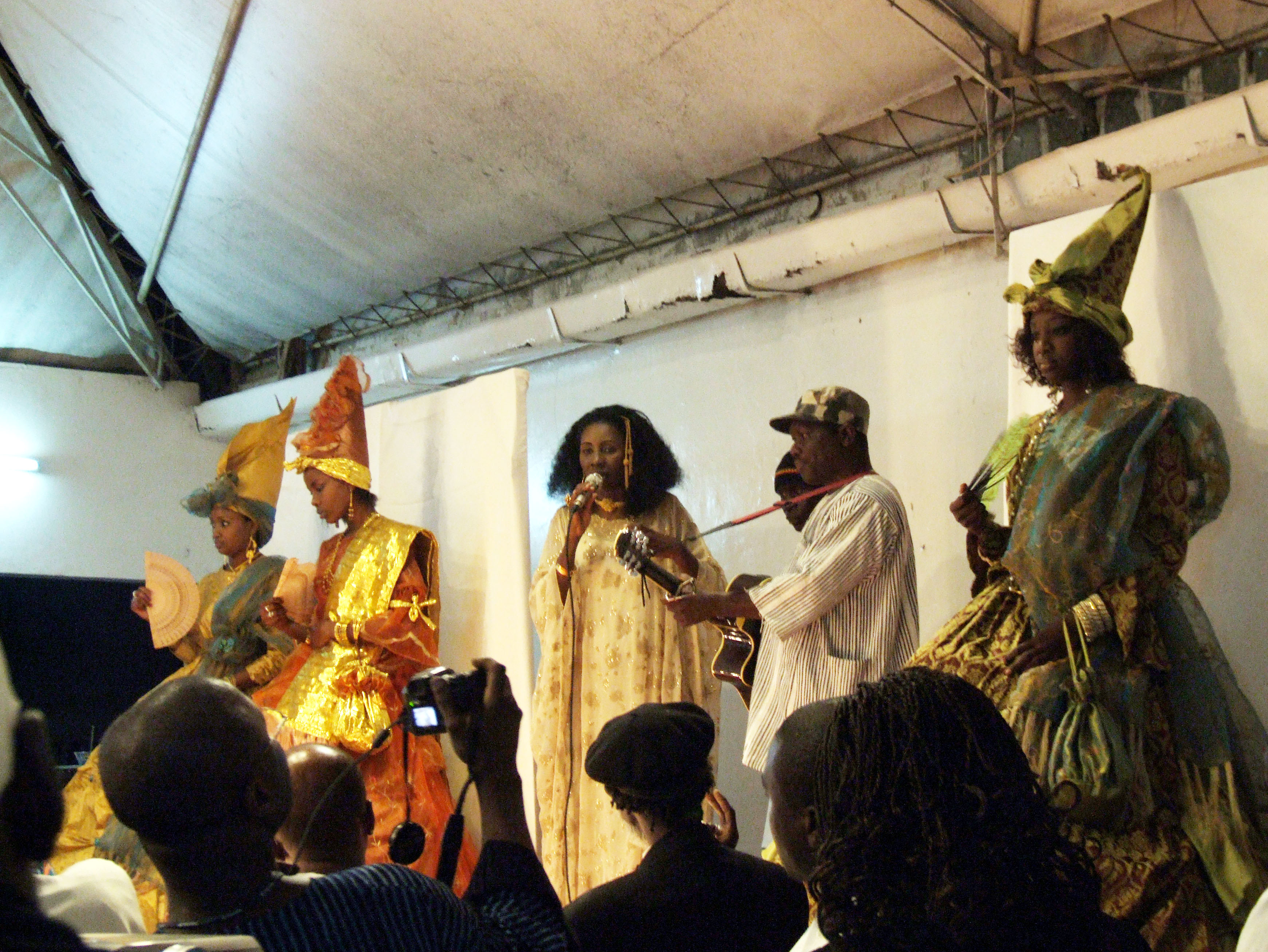 La styliste sénégalaise Oumou Sy au cybercafé Metissacana de Dakar lors d'un défilé en hommage au Président Léopold Sédar Senghor lors de la Biennale de Dakar 2006